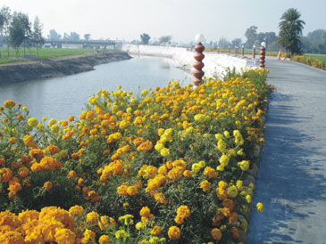 vain at present 2